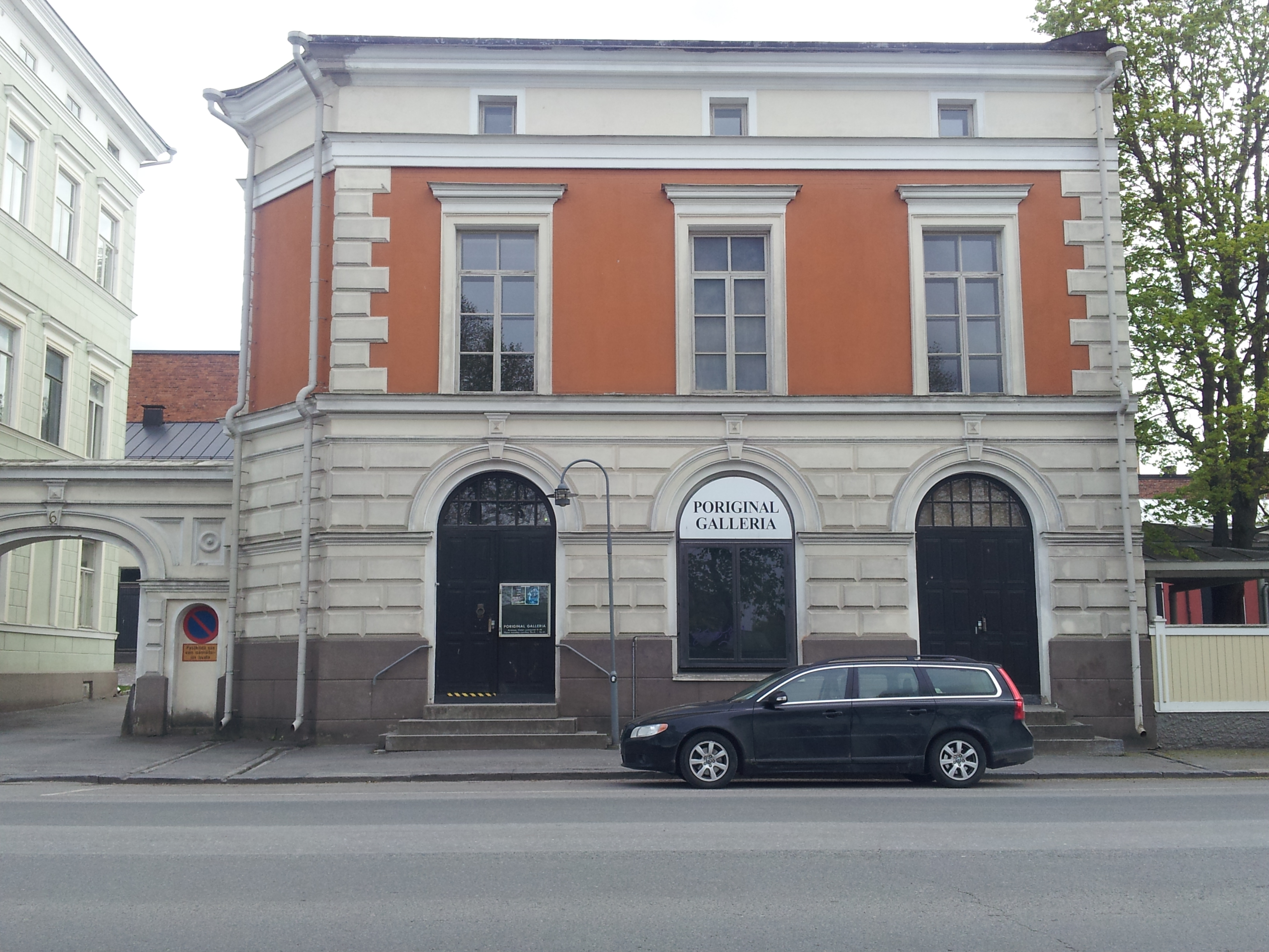 Poriginal galleria